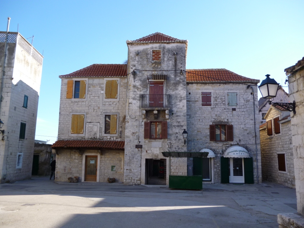 Kaštel Koriolana Ćipika u Kaštel Starom